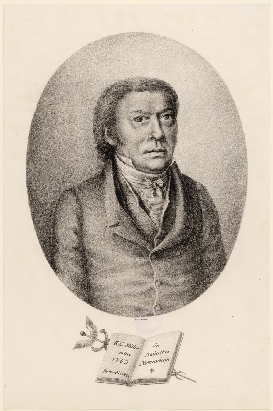 Porträt Karl Christoph Stiller (1763-1836). Inschrift im Buch: "K.C. Stiller / natus / 1763 / Rostochii 1824" rechts: "Jn / Amicitiae / Memoriam". Lithographie, 353 x 232 mm (Blatt), 249 x 194 mm (Bild) Gedruckt bei Speckter & Co., Hamburg. Enstehungsort: Rostock, 1824. Deutsche Nationalbibliothek, Deutsches Buch- und Schriftmuseum Leipzig, Inventarnummer Bö-Bl/P/2329, Katalognummer P 53/1714.